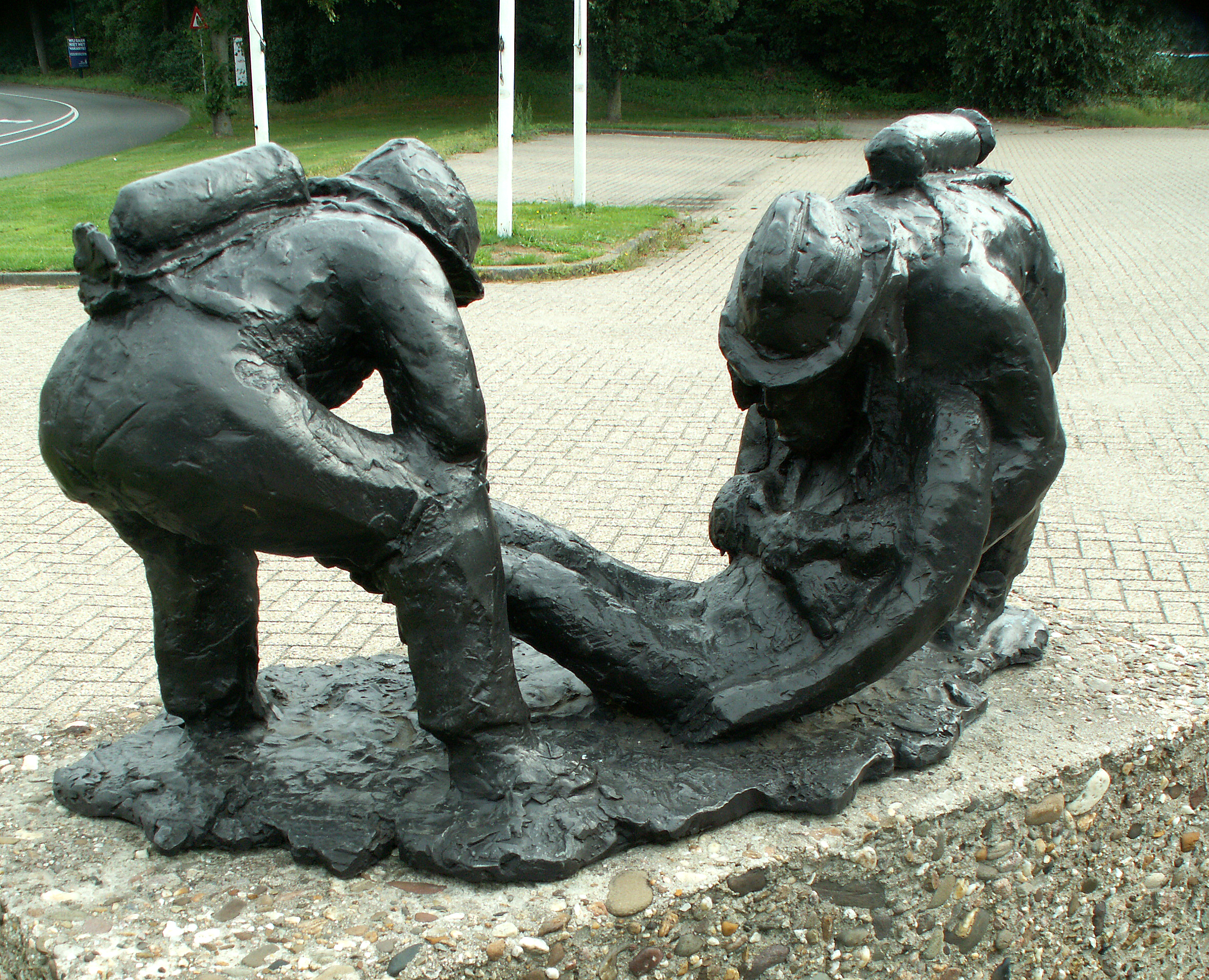 Sculpture "De reddende brandweerman" (Rautekgreep) by Peter de Leeuwe, 1991, brandweerkazerne, Burg. vd Postlaan Leusden